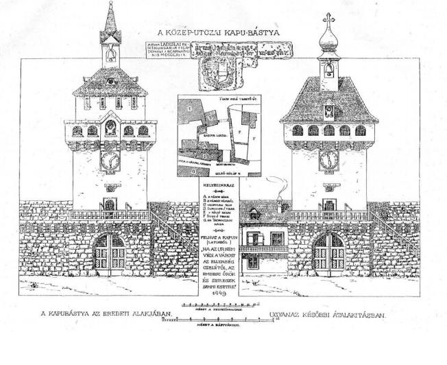 A Közép-utcai kapu bástyája